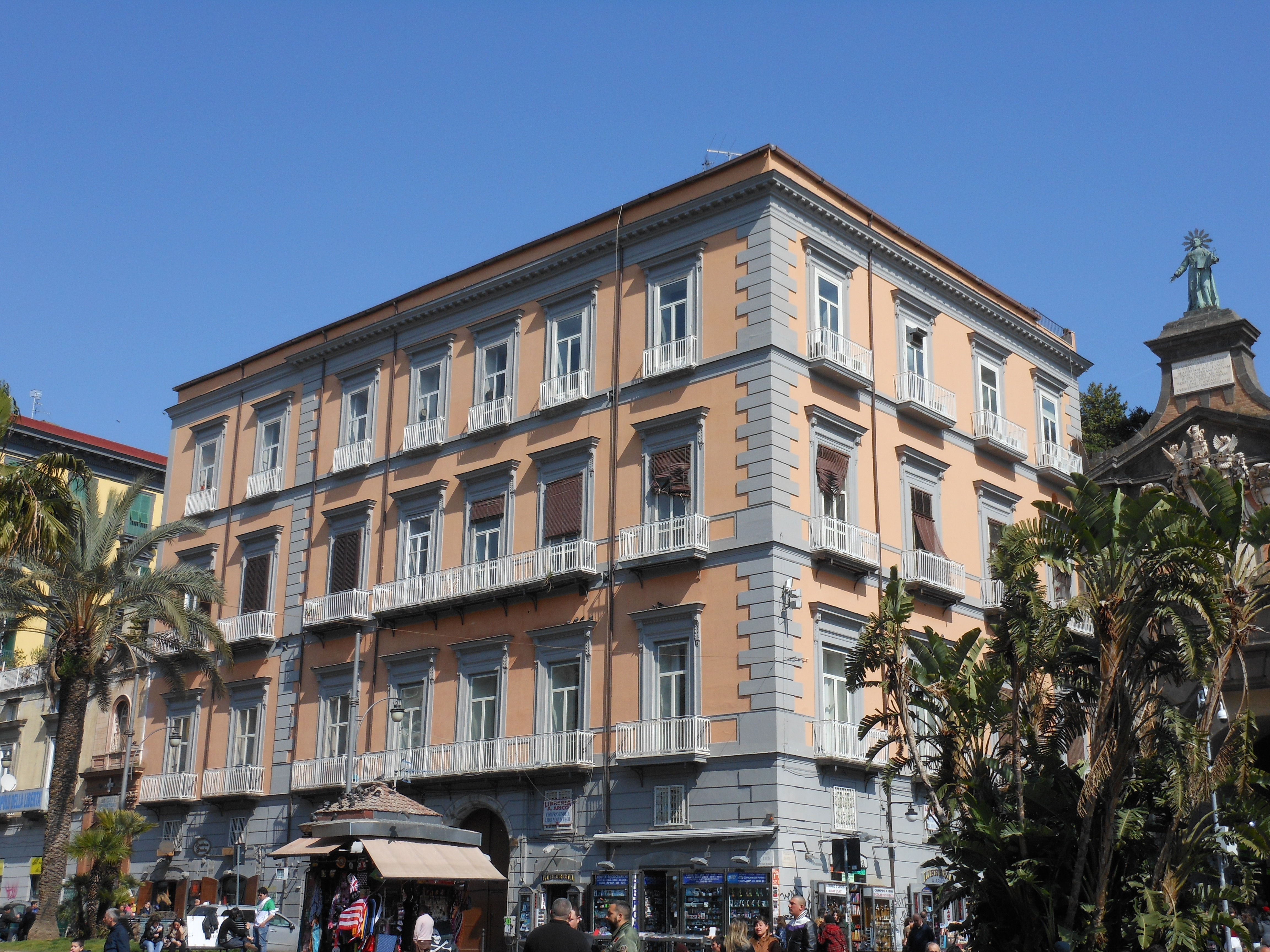 Palazzo Rinuccini in piazza Dante a Napoli